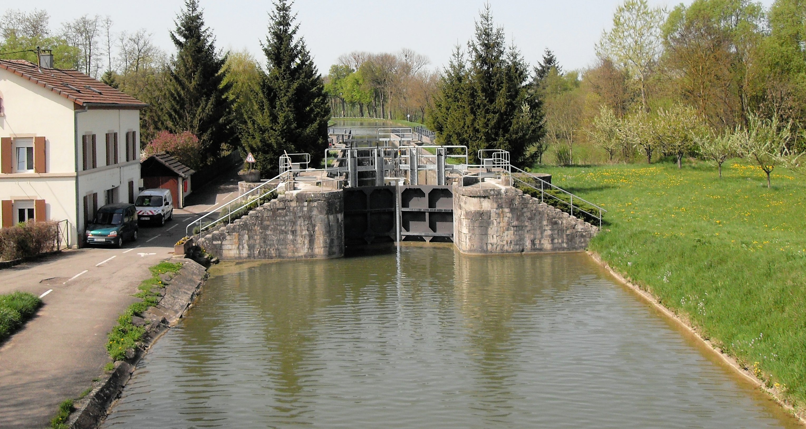 L'écluse avant le pont-canal à Wolfersdorf, Canal du Rhône au Rhin